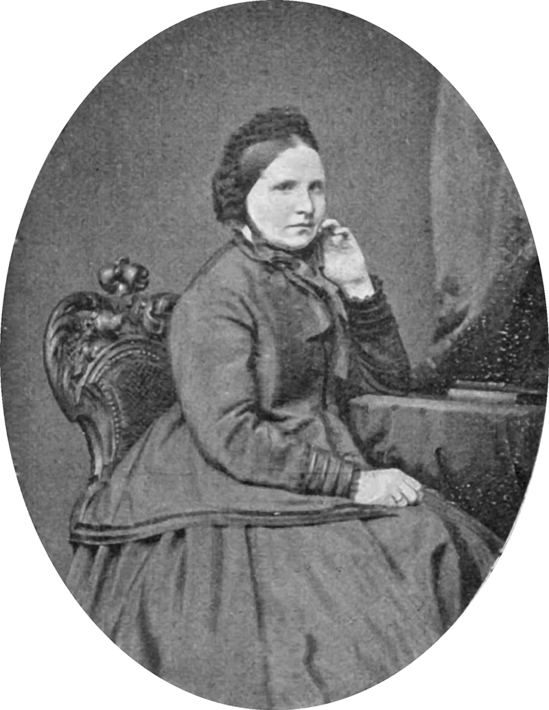 Ida von Bodelschwingh (1835-1894), Ehefrau von Friedrich von Bodelschwingh